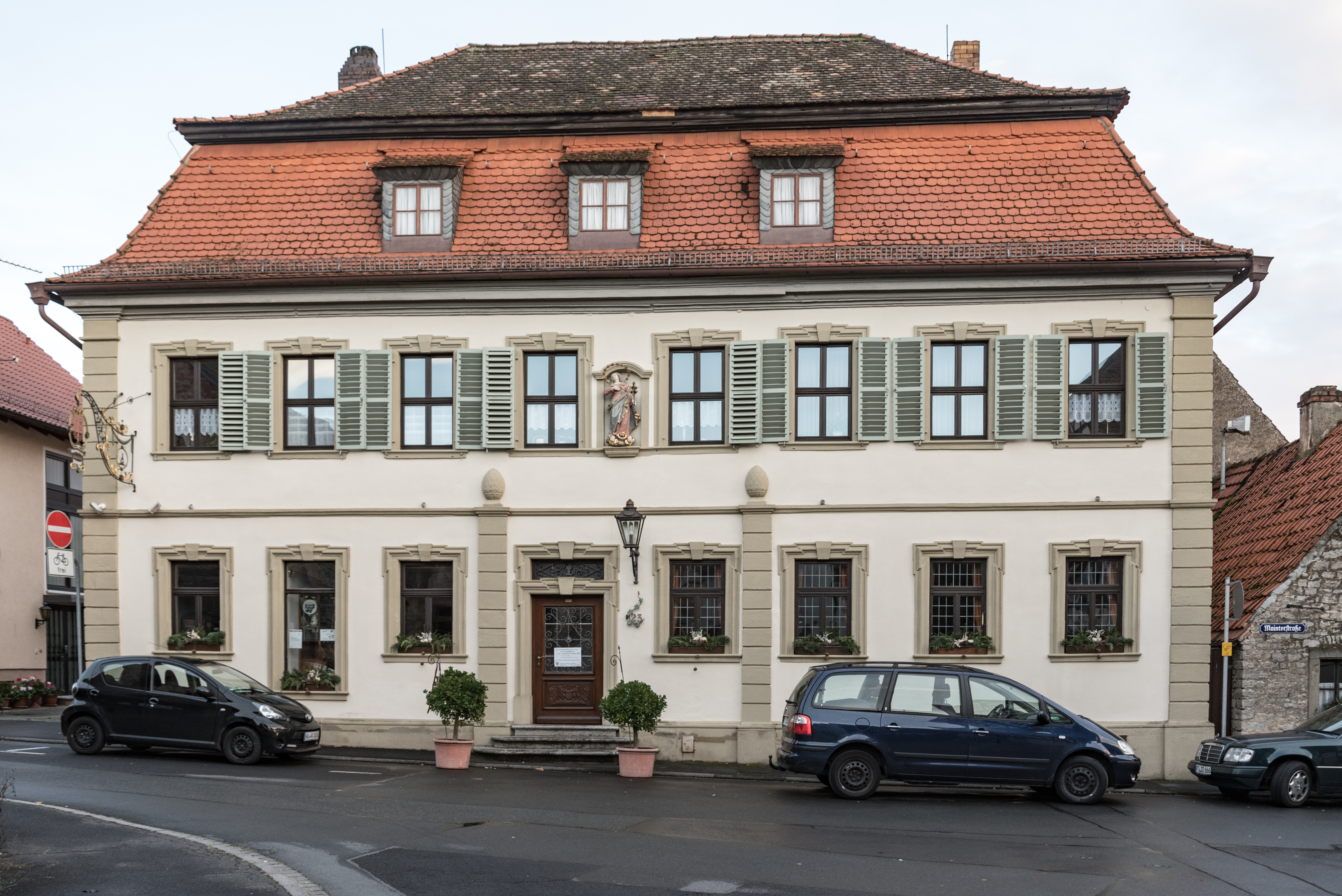 Sommerach, Maintorstraße 23